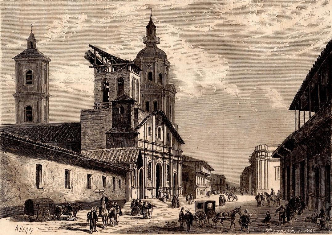 Vue de l'église de la Compagnie de Jésus, place du Consulat à Santiago du Chili, détruite par un incendie qui a coûté la vie à deux mille personnes.